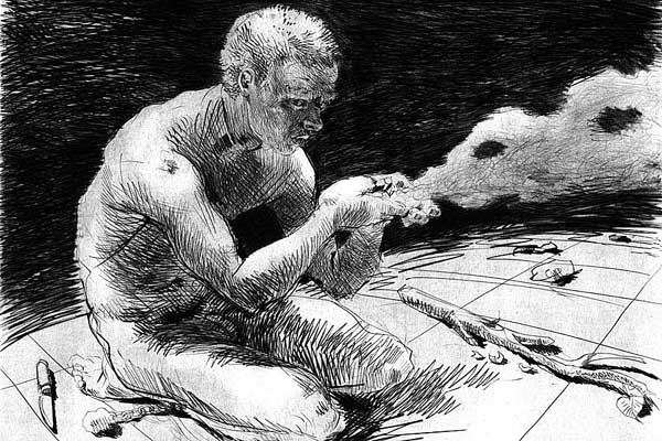 Kaltnadelradierung von Wolfram Gothe; 1995